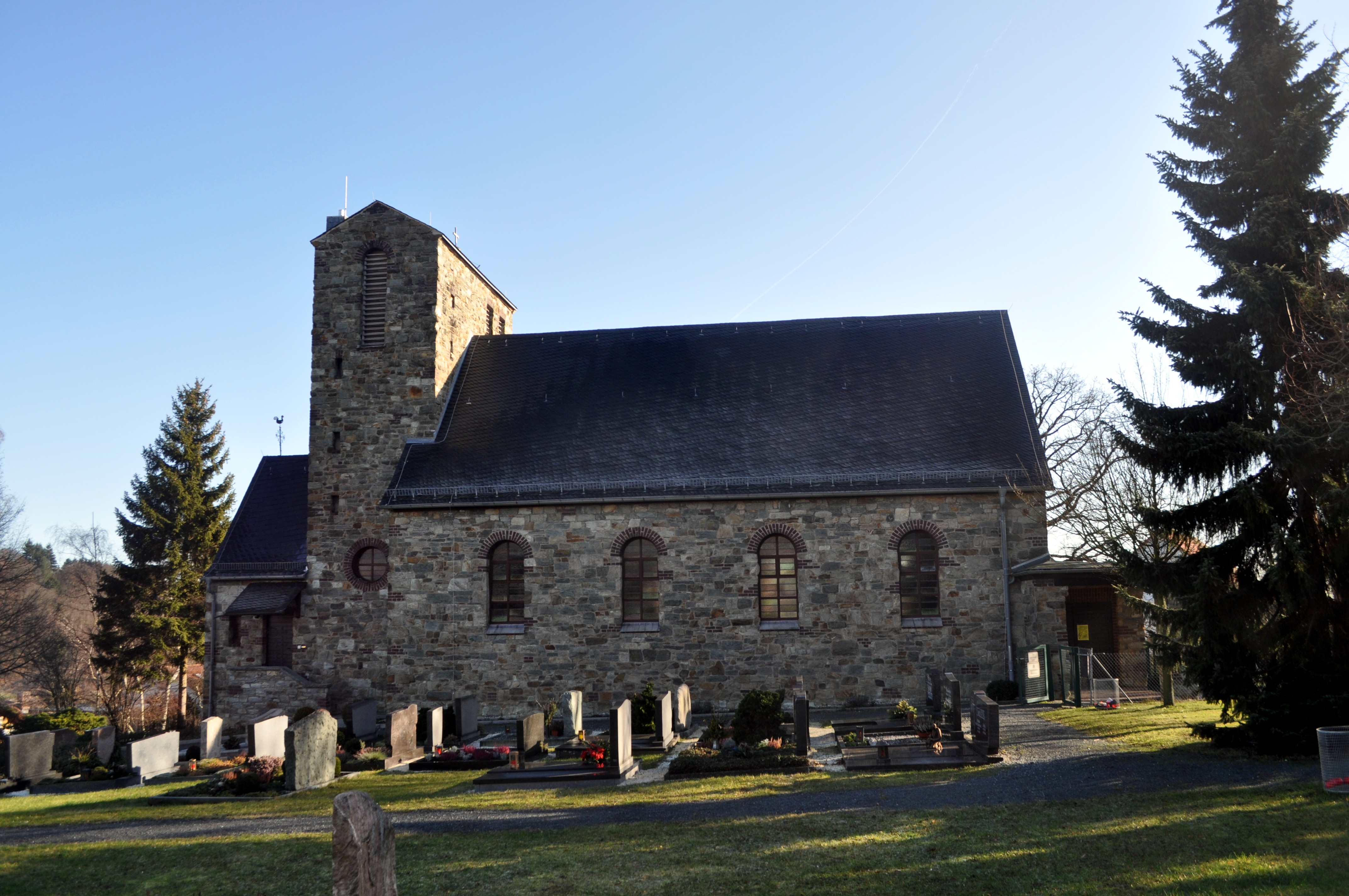 Denkmalgeschützte Katholische Kirche Maria Geburt in Altenhain, Seitenansicht